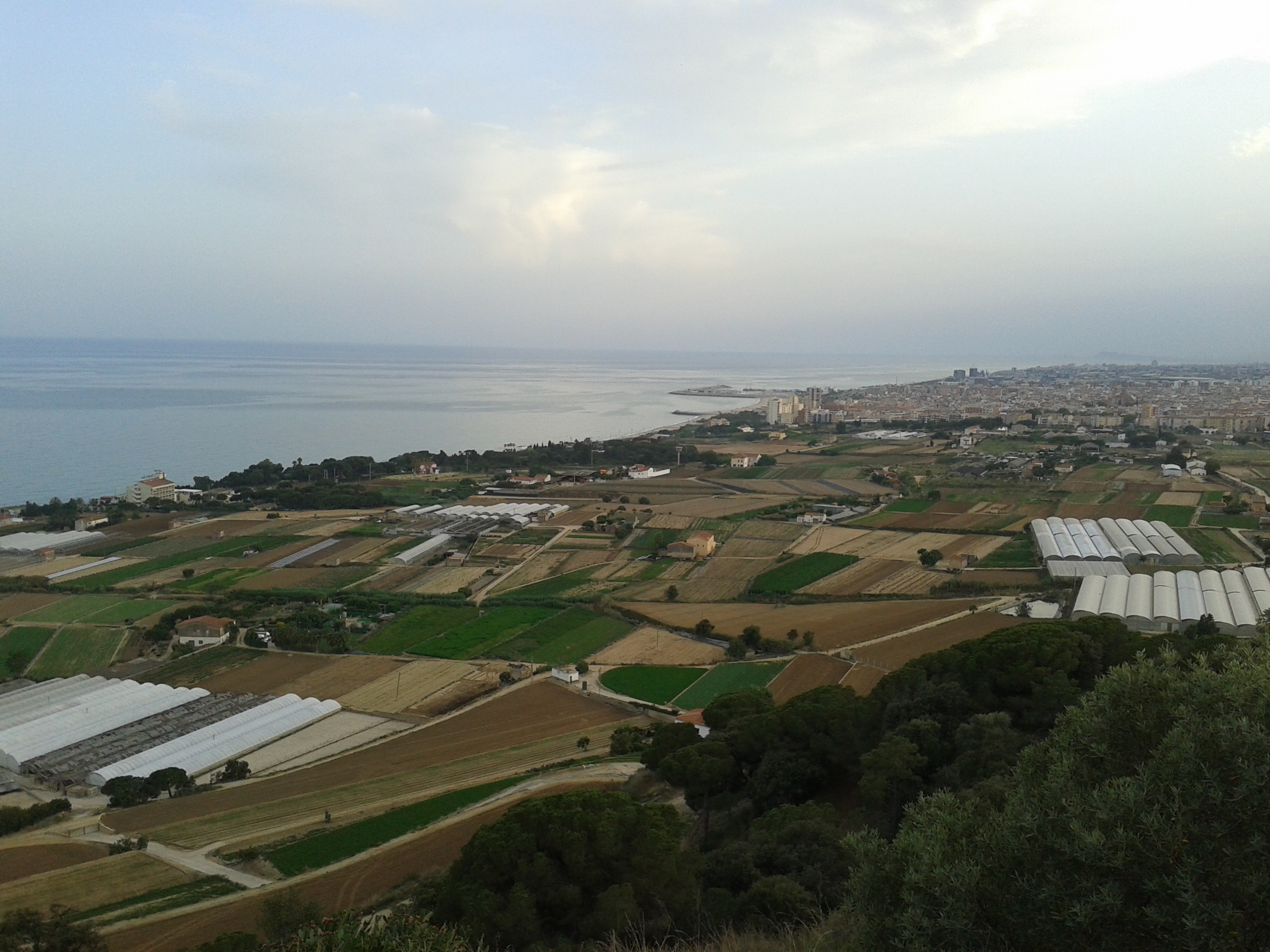 Vista de Les Cinc Sènies des del turó d'Onofre Arnau